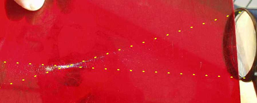 מיקוד אור שמש דרך זכוכית מגדלת רישיון נוצר על ידי משתמש:גדי ו.